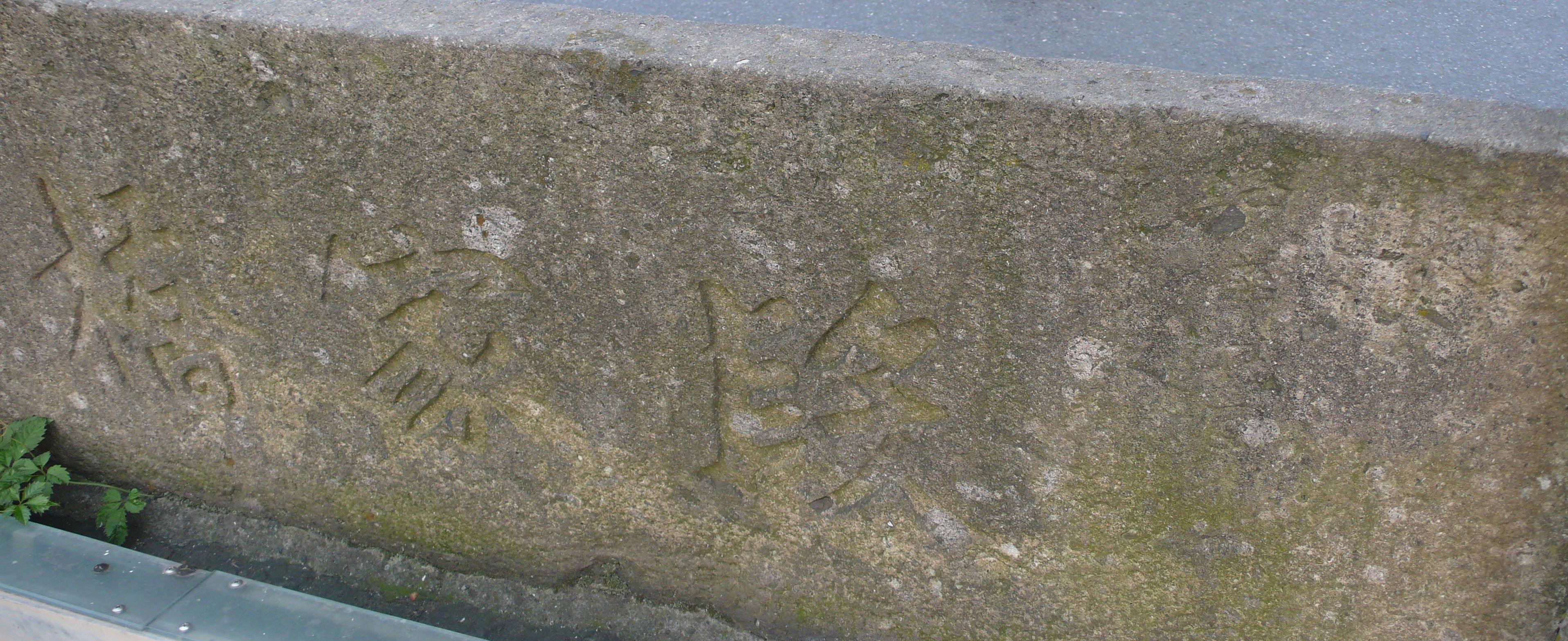 中文（台灣）: 杭州段家桥的桥匾